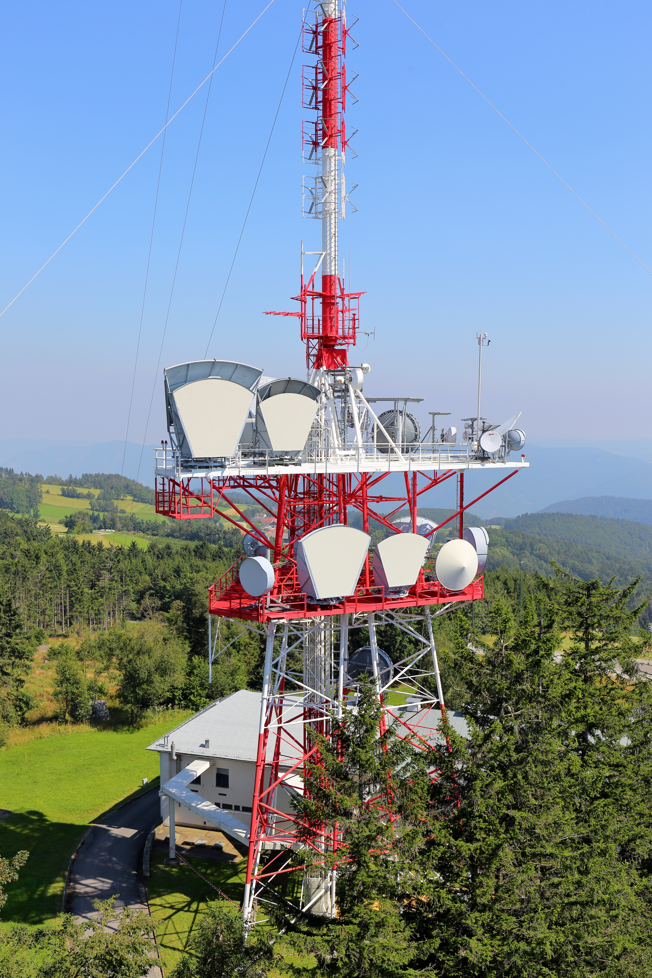 Blick von der 38 m hohen Jauerling-Aussichtswarte in Maria Laach am Jauerling, eine niederösterreichische Marktgemeinde in der Wachau, auf die Großsendeanlage St.Pölten-Jauerling. Die Sendeanlage auf 952 m Höhe, unmittelbar neben dem "Südgipfel" mit 960 m Höhe, wurde ab 1955 errichtet und 1958 offiziell eröffnet. Der 141 m hohe Sendemast ist dreifach in drei Ebenen abgespannt und in Hybridbauweise errichtet. Die unterste Ebene mit einer Höhe von rd. 35 m ist eine freistehende Gitterrohr-Mastkonstruktion mit 2 Plateaus. Darauf ist eine rund 80 m hohe Rohrmastkonstruktion und über dieser ein rd. 25 m hoher GFK-Antennenzylinder montiert.